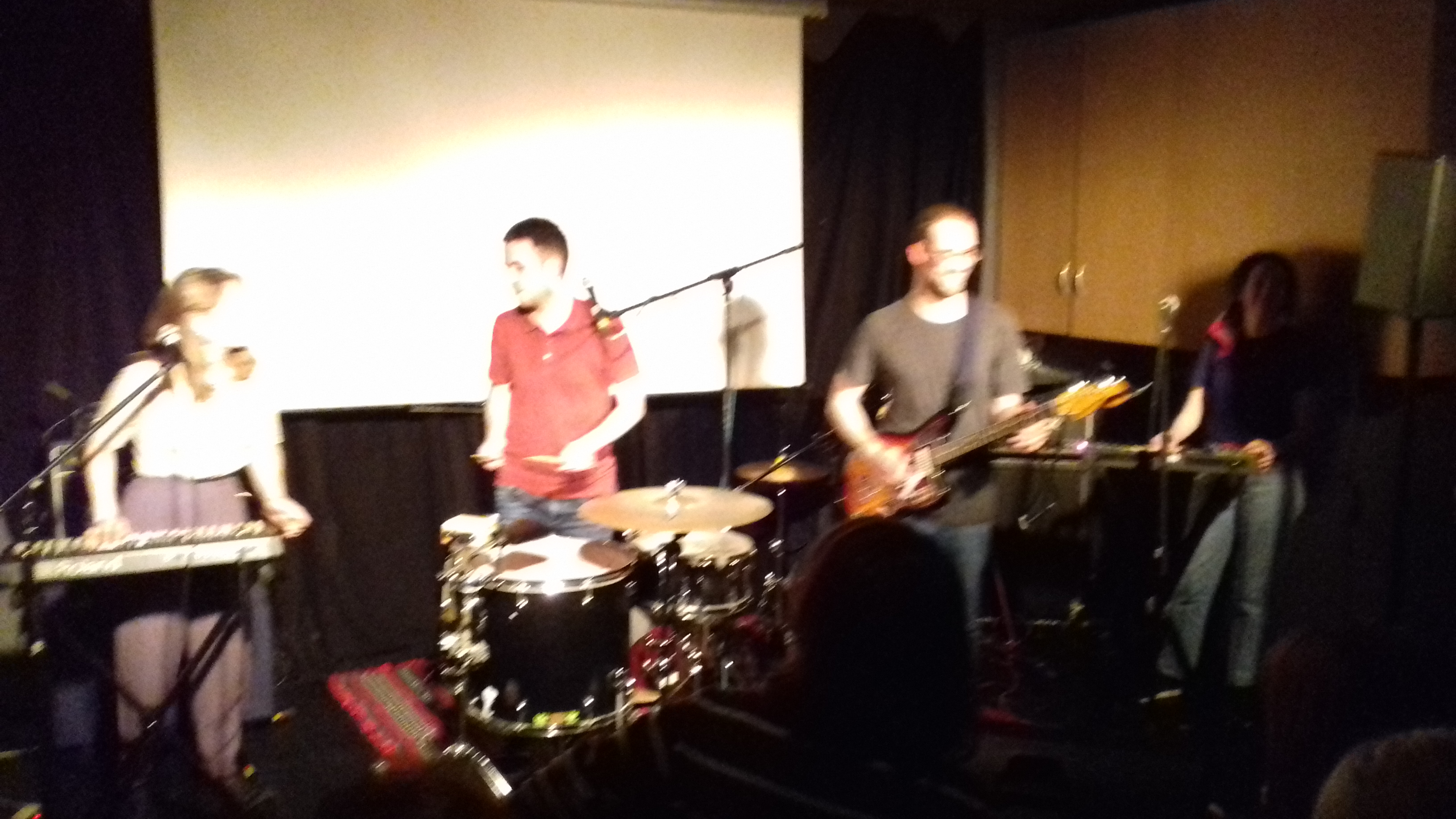 Esposa en concerto na Gentalha do Pichel, no 17 aniversario do Cineclube Compostela